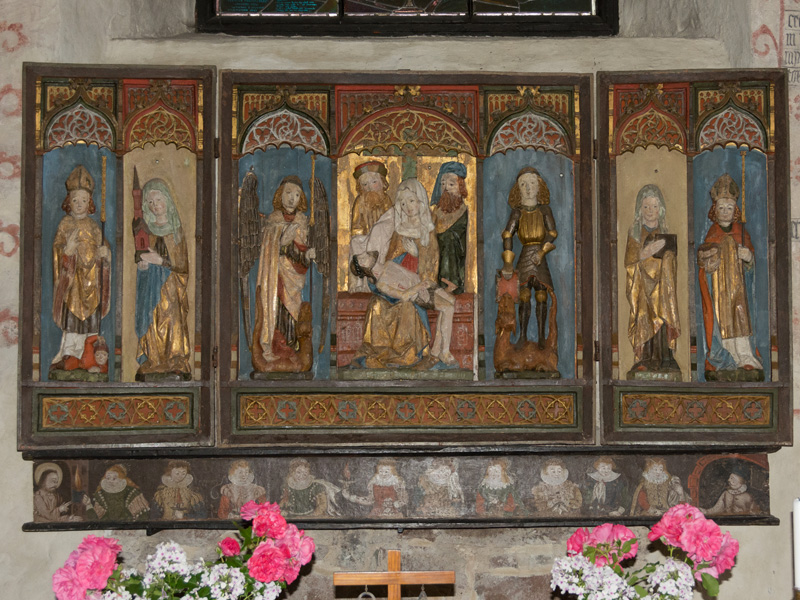 Finströms kyrka Altartavla